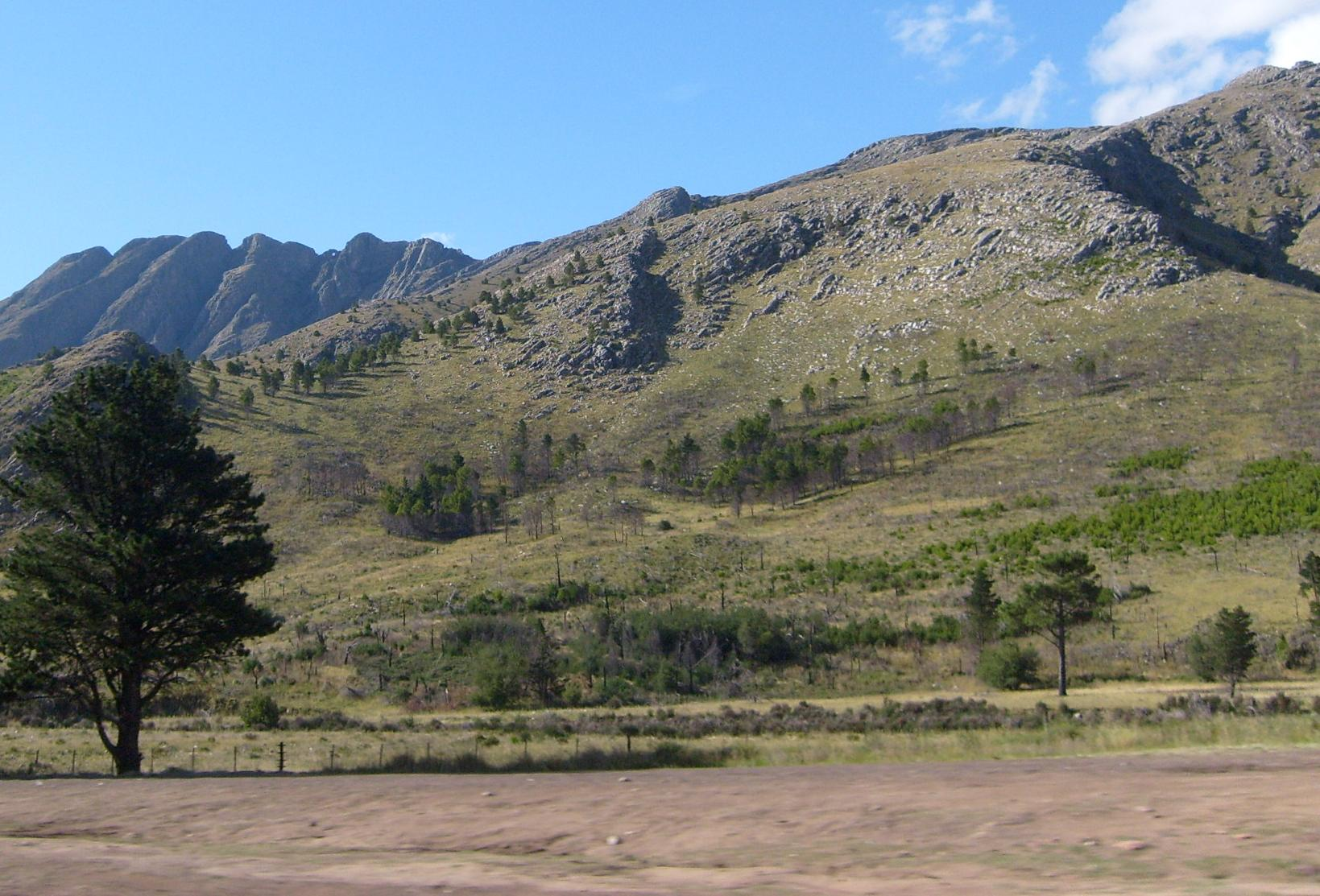 Proliferación del Pinus alpensis debido a los paulatinos incendios al pie del cerro Ventana.